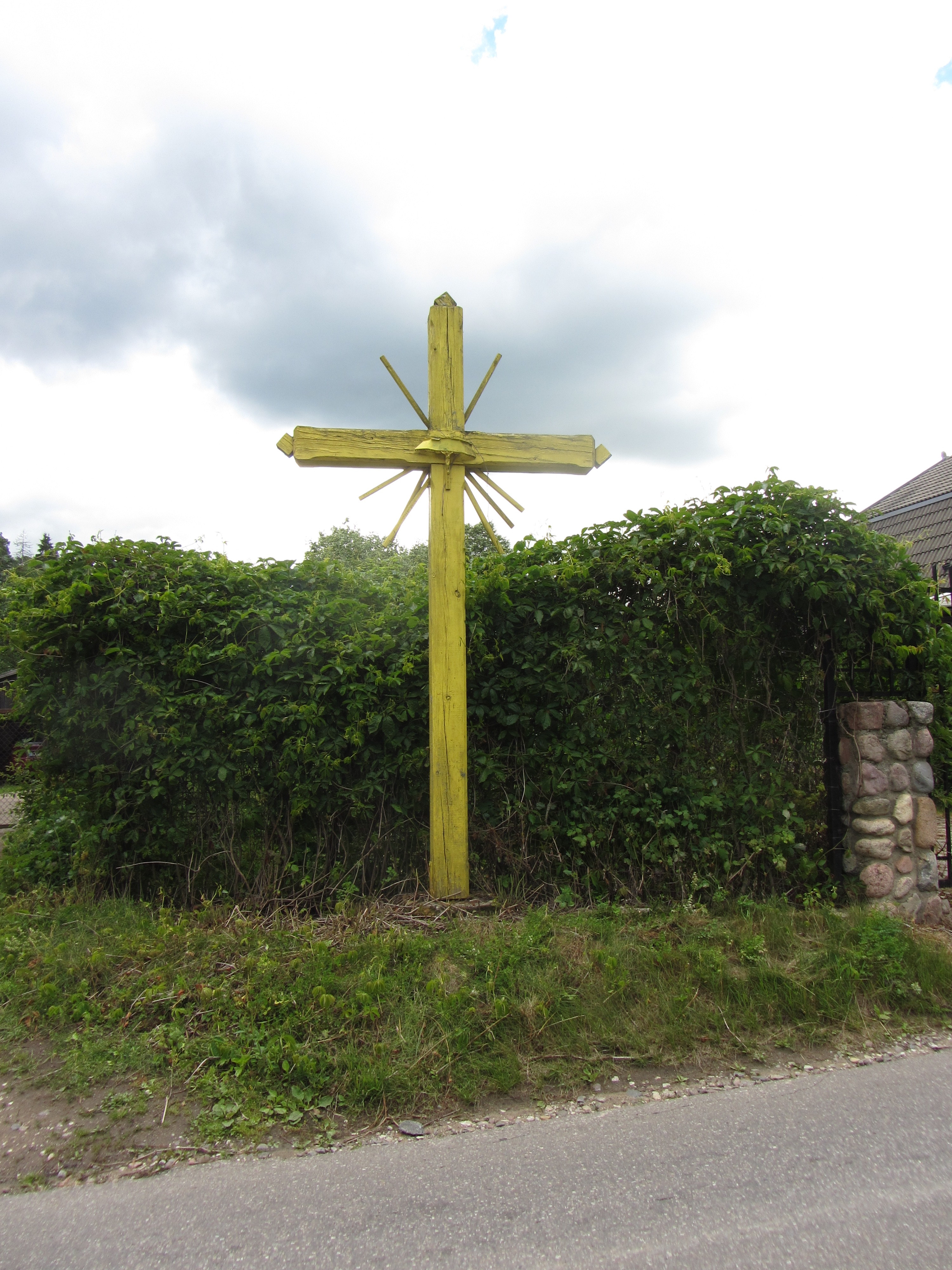 Vosyliukai 21401, Lithuania